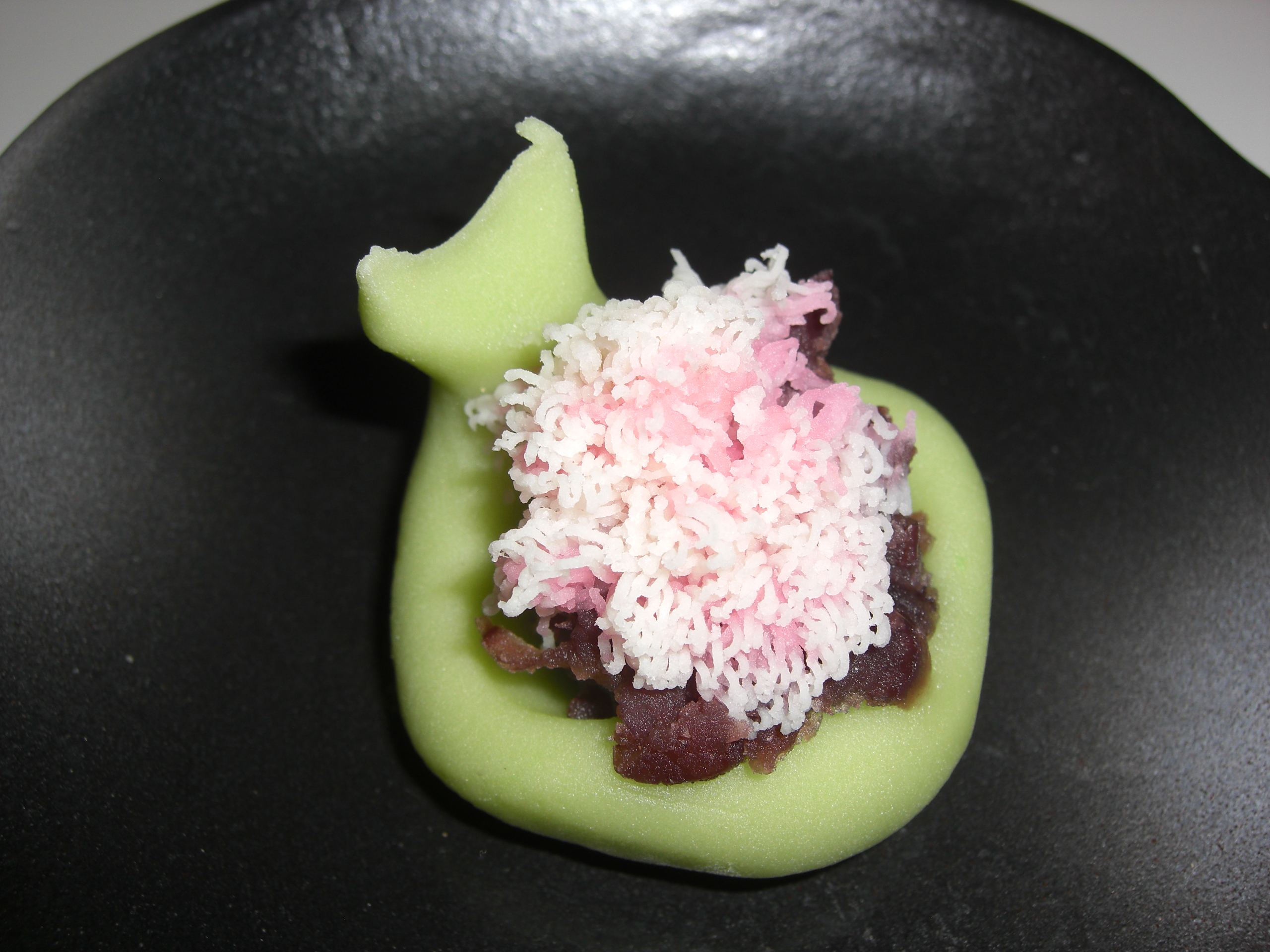 ひちぎり こなし製 ひな祭りの和菓子